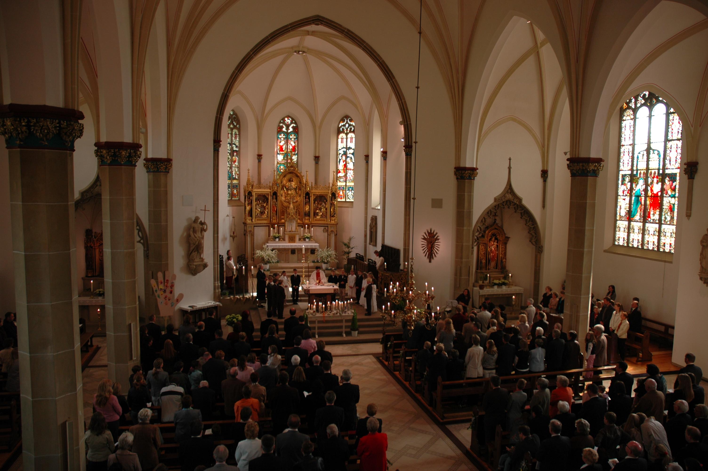 Erstkommunionfeier in der Pfarrkirche St. Johannes Bösensell (Senden, Kreis Coesfeld, Nordrhein-Westfalen, Deutschland)